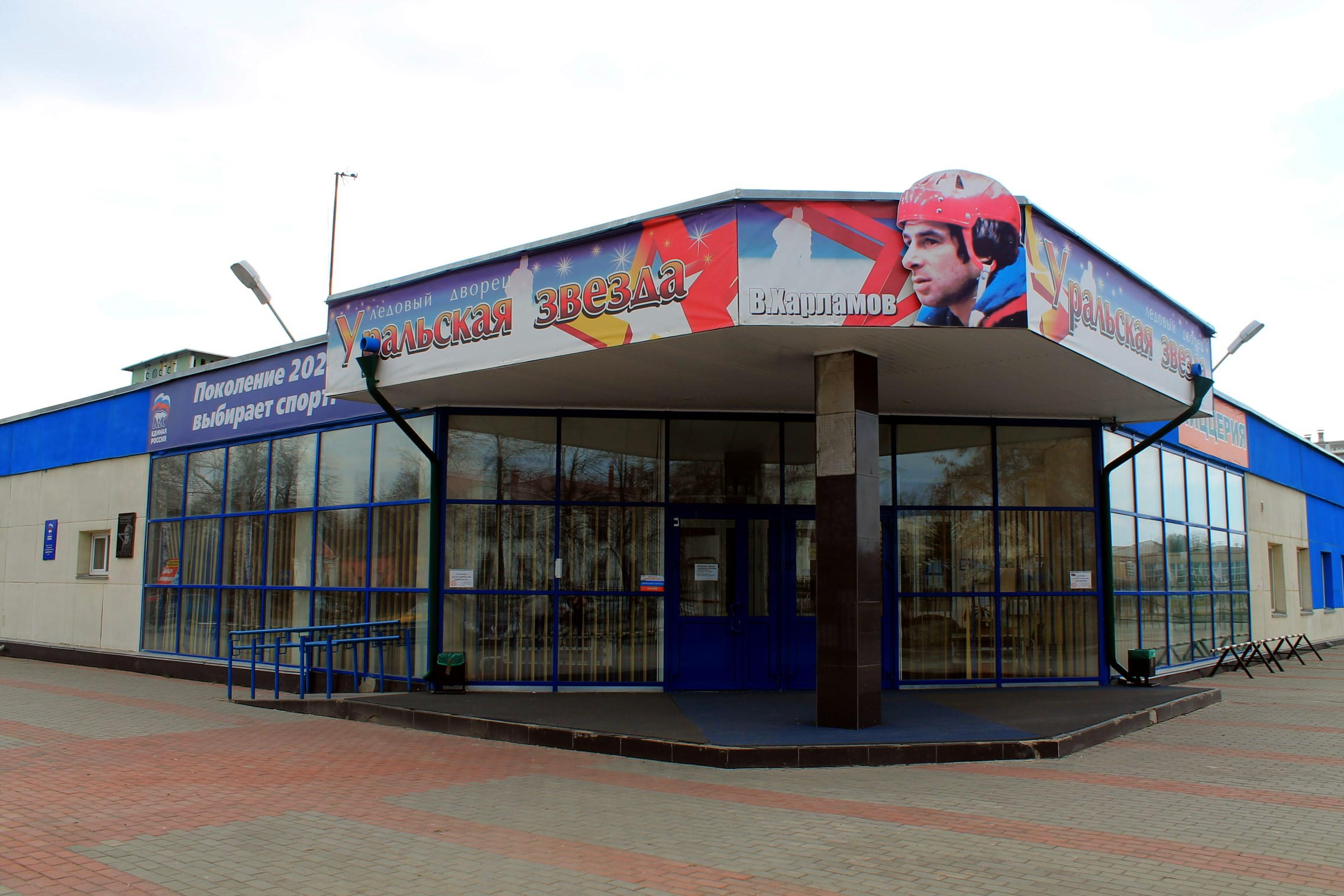 Ледовый Дворец "Уральская Звезда"